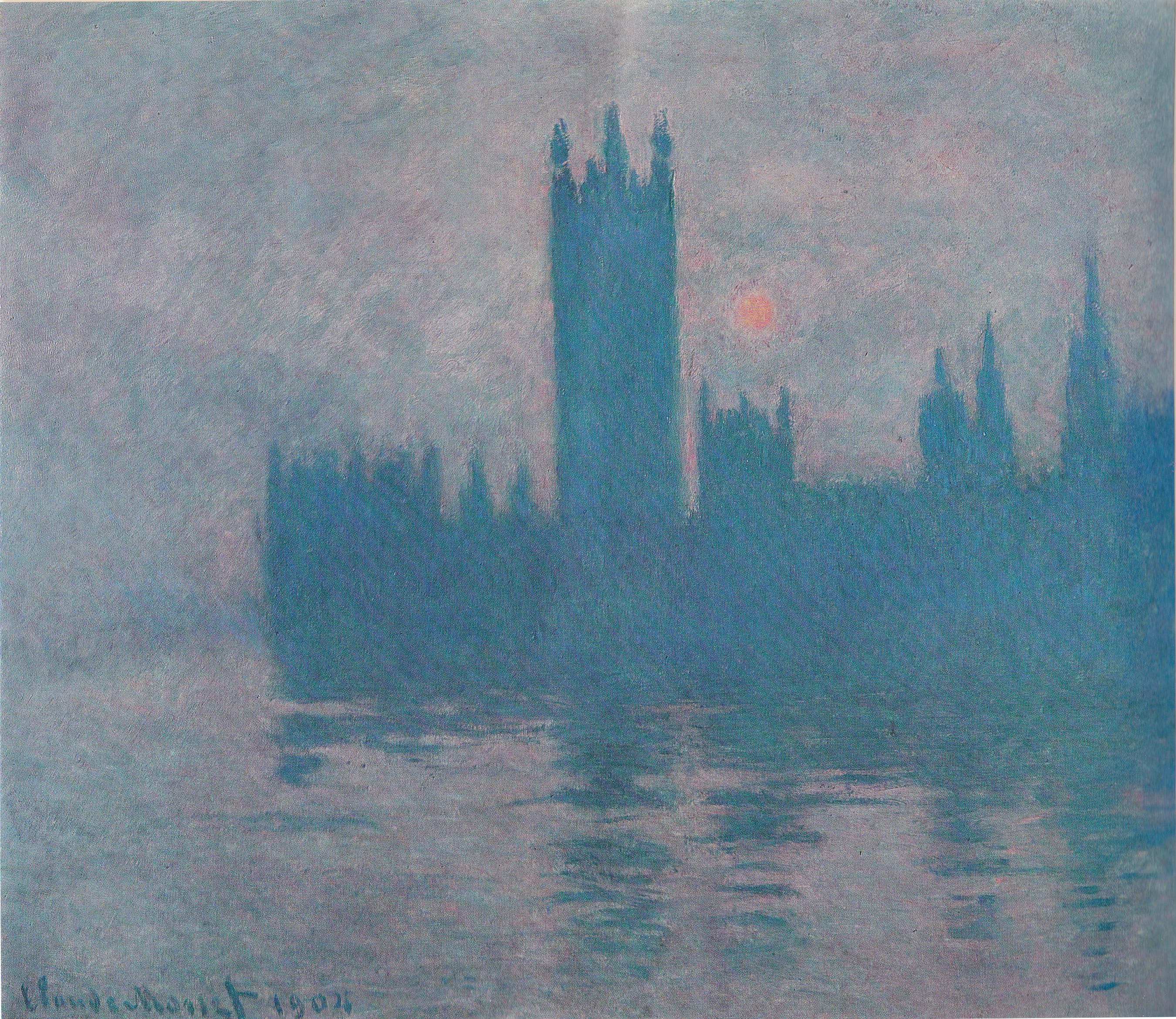 Claude Monet Das Parlamentsgebäude in London, 1904 Öl auf Leinwand 80 x 91 cm